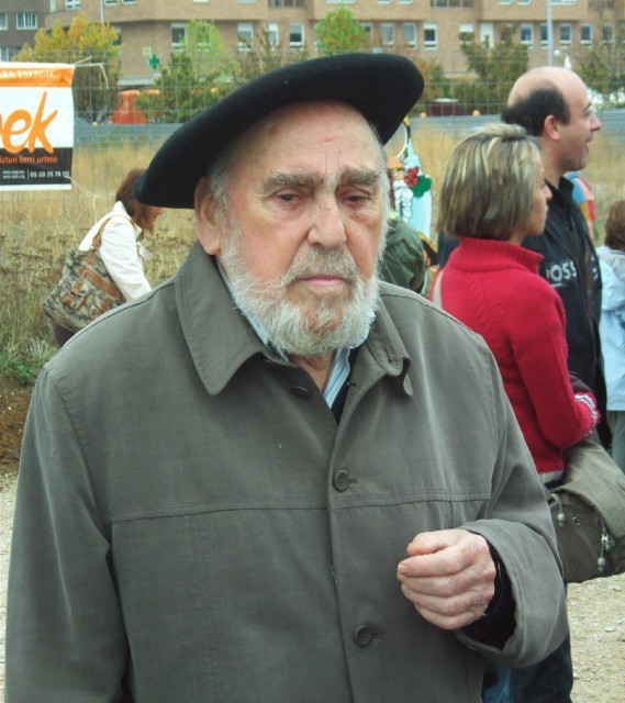 Pablo Antoñana idazlea 2008ko Nafarroa Oinezen.